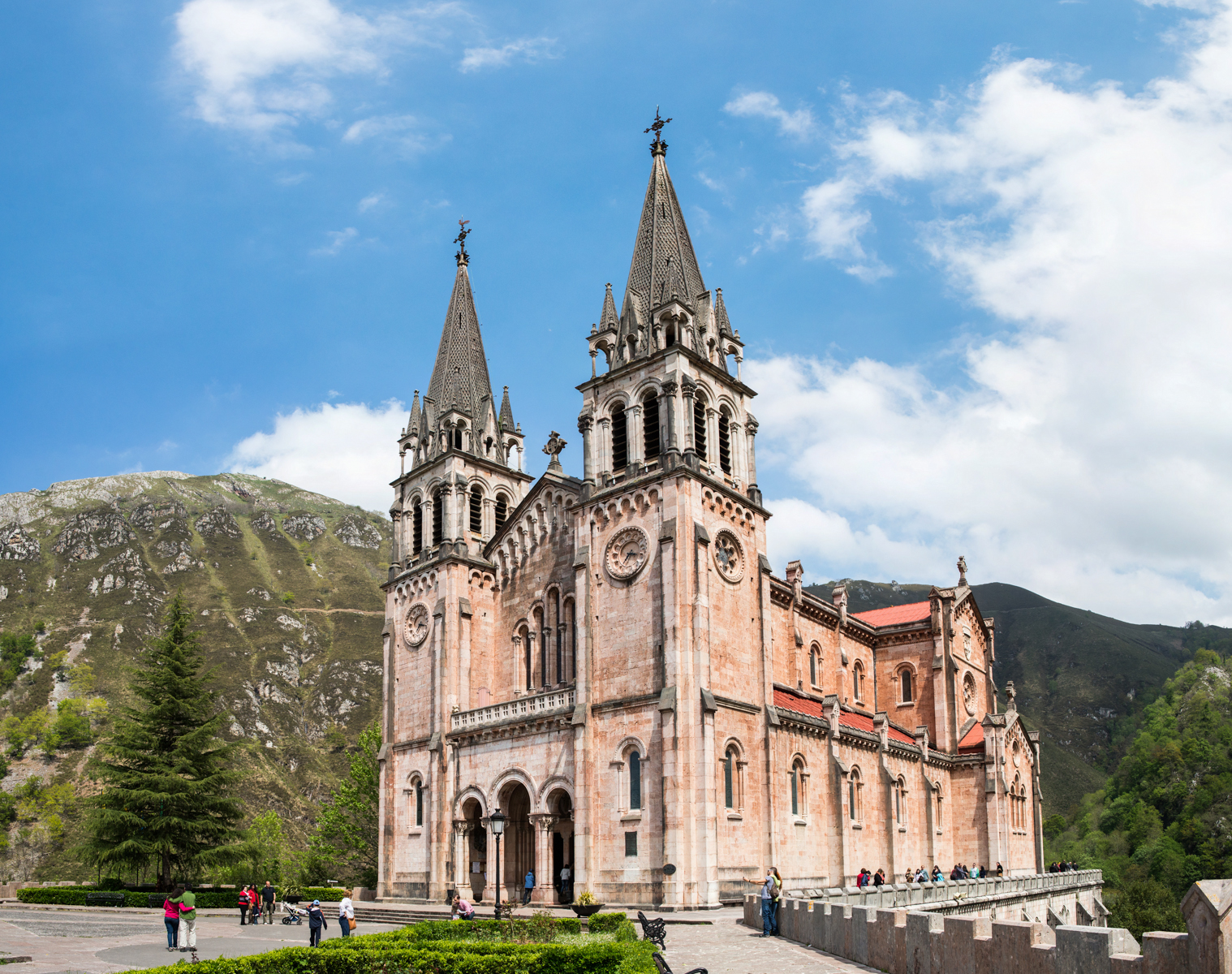 Covadonga